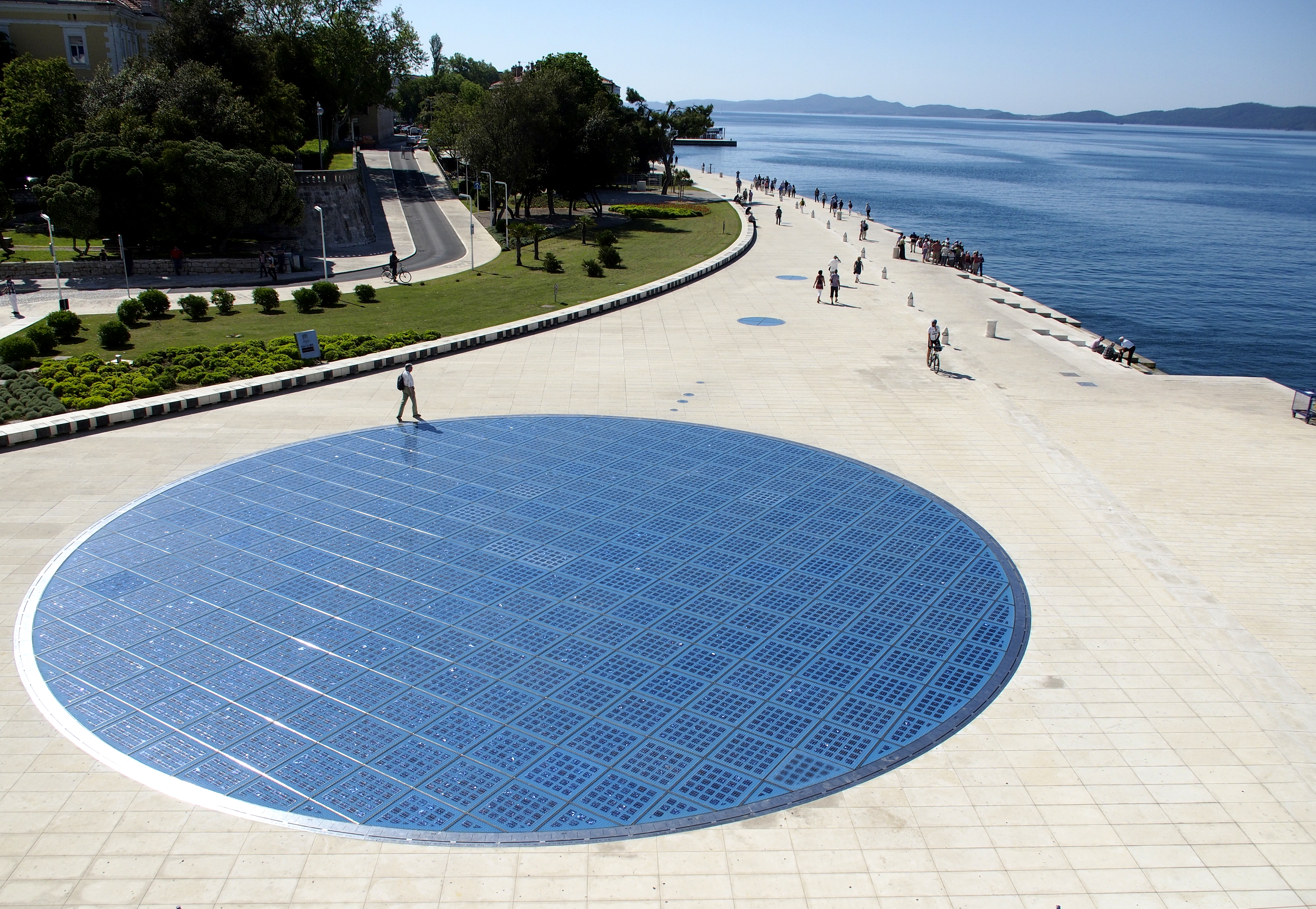 Glasplattenkreis des Lichtspiel-Monuments, weiter hinten befindet sich die Meeresorgel